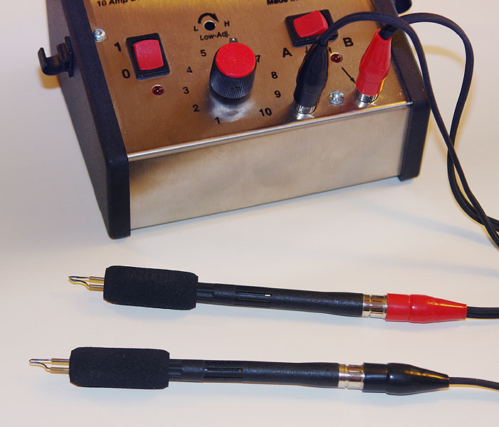 Pyrograveur réglable